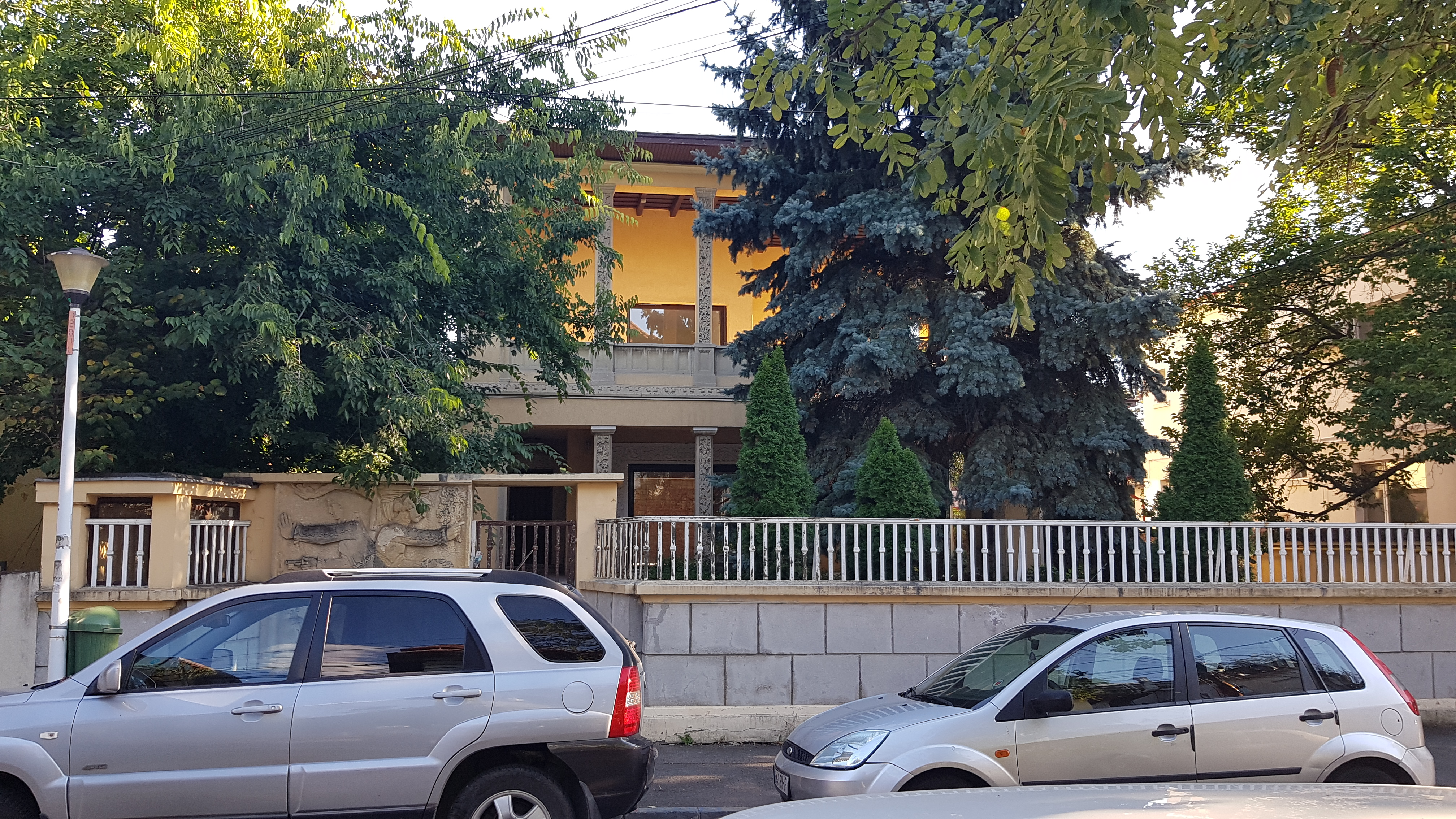 Casă, monument istoric